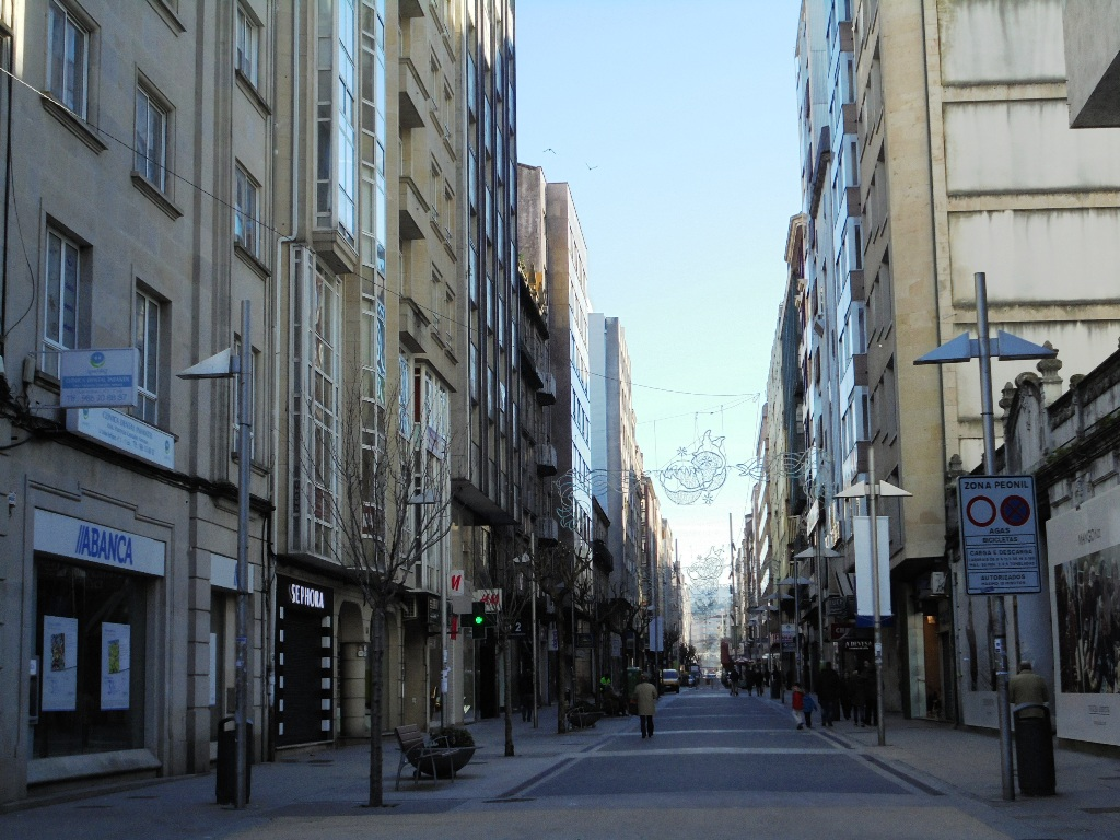 Calle peatonal Benito Corbal en Pontevedra capital